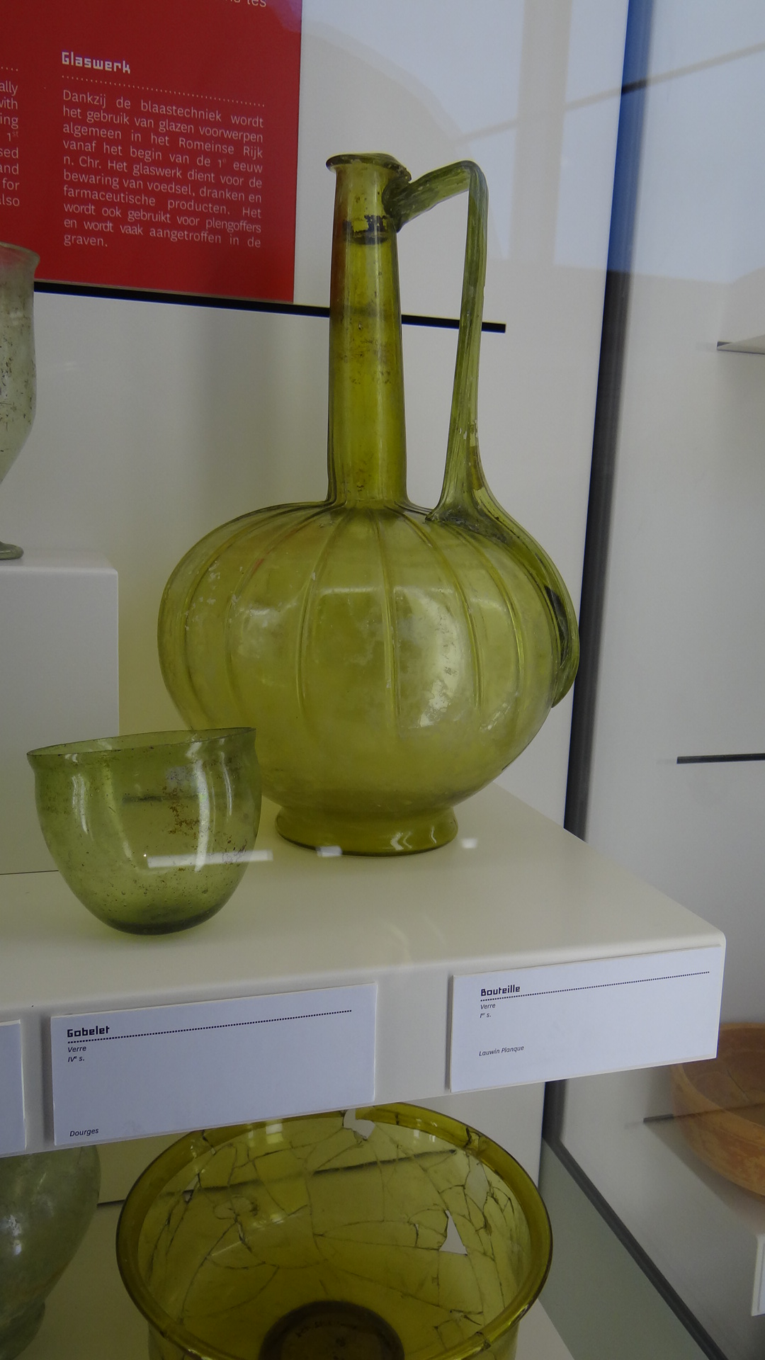 Arkèos - Vase de Lauwin-Planque Ier siècle